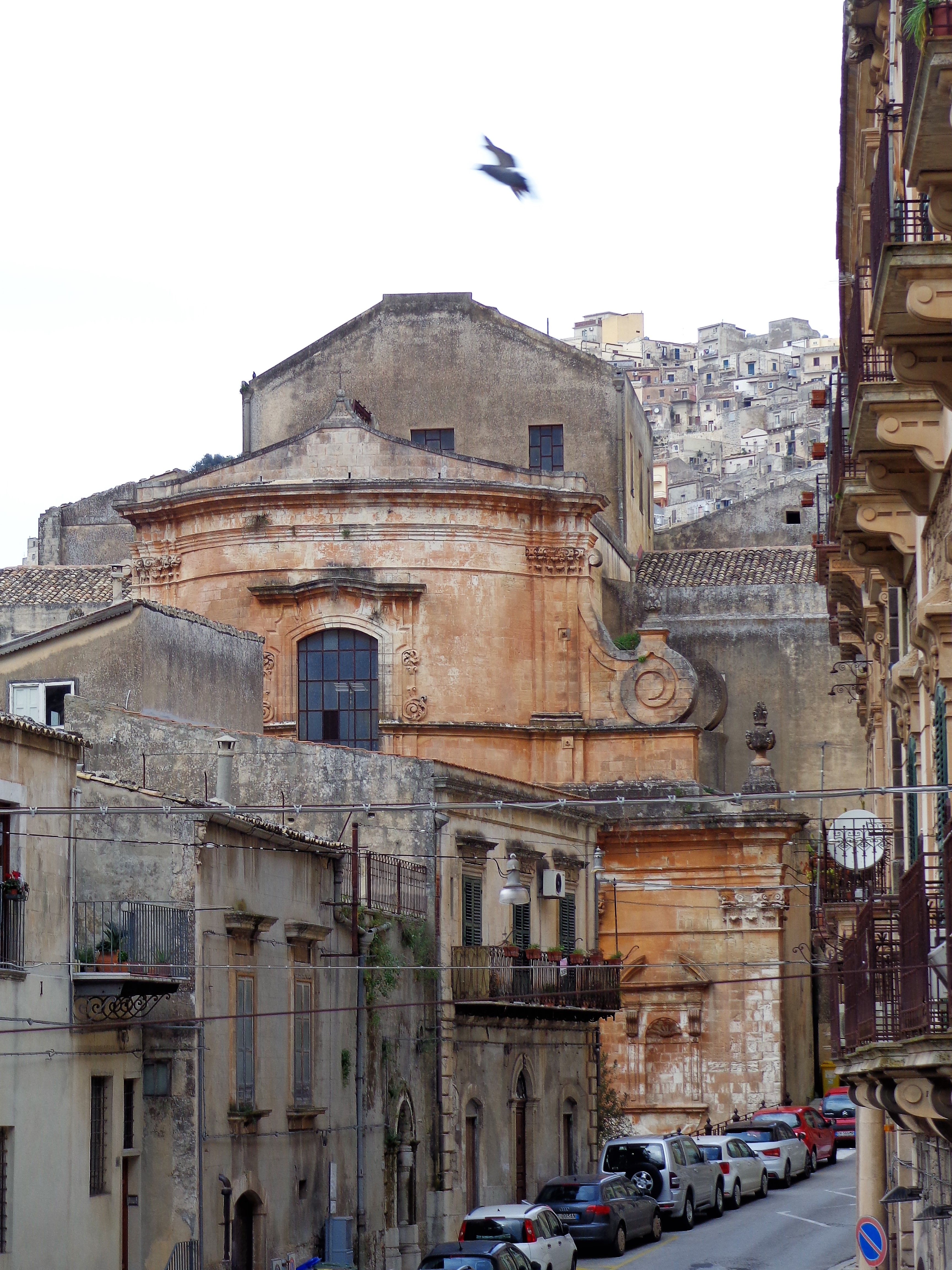 Chiesa Santa Maria del Soccorso inquadrata dalla gradinata di San Pietro.